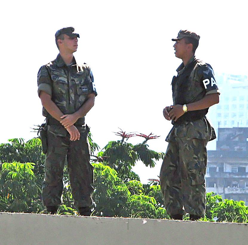 Soldados da Polícia da Aeronáutica do Brasil guardando o Altar da Pátria.